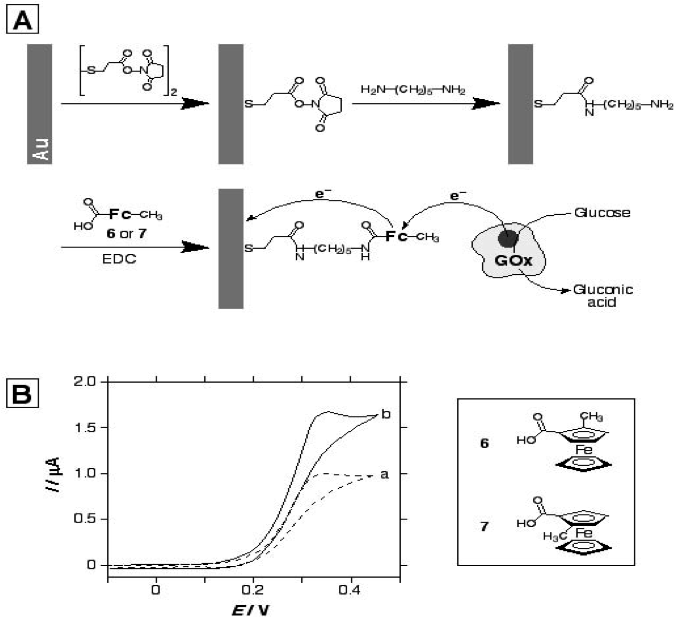 voltamperiometria ciclica